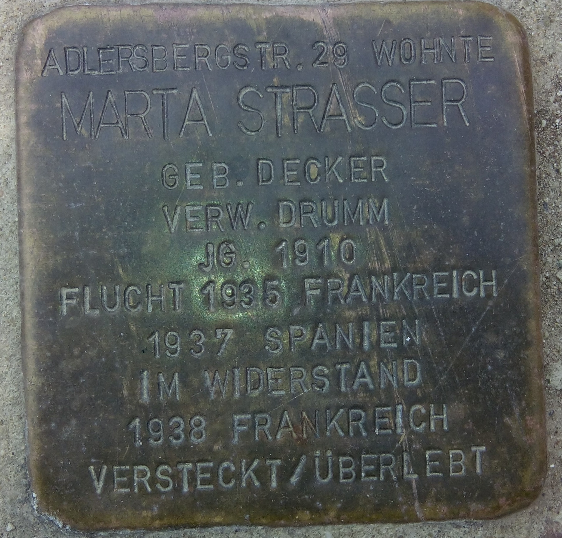 Stolperstein von Marta Strasser